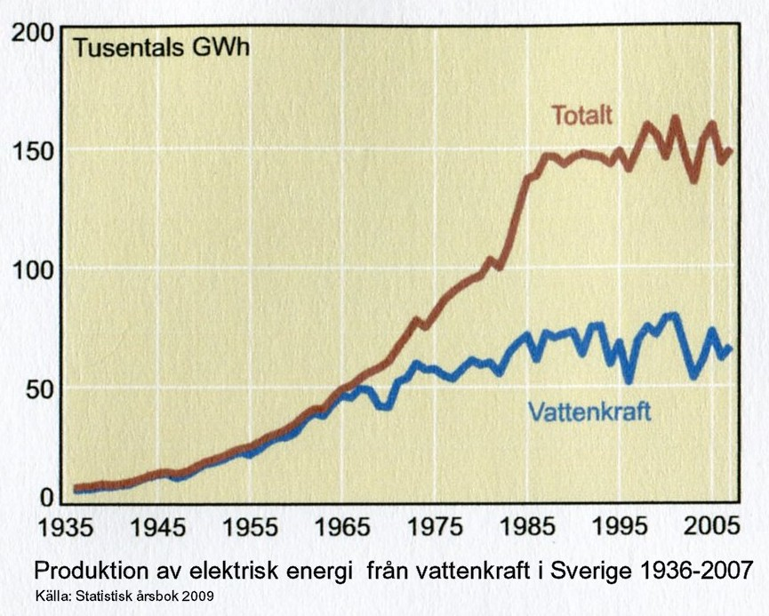 Produktion av elektrisk energi med hjälp av vattenkraft i Sverige 1936-2007 i förhållande till den totala produktionen. Källa: Statistisk årsbok 2009.